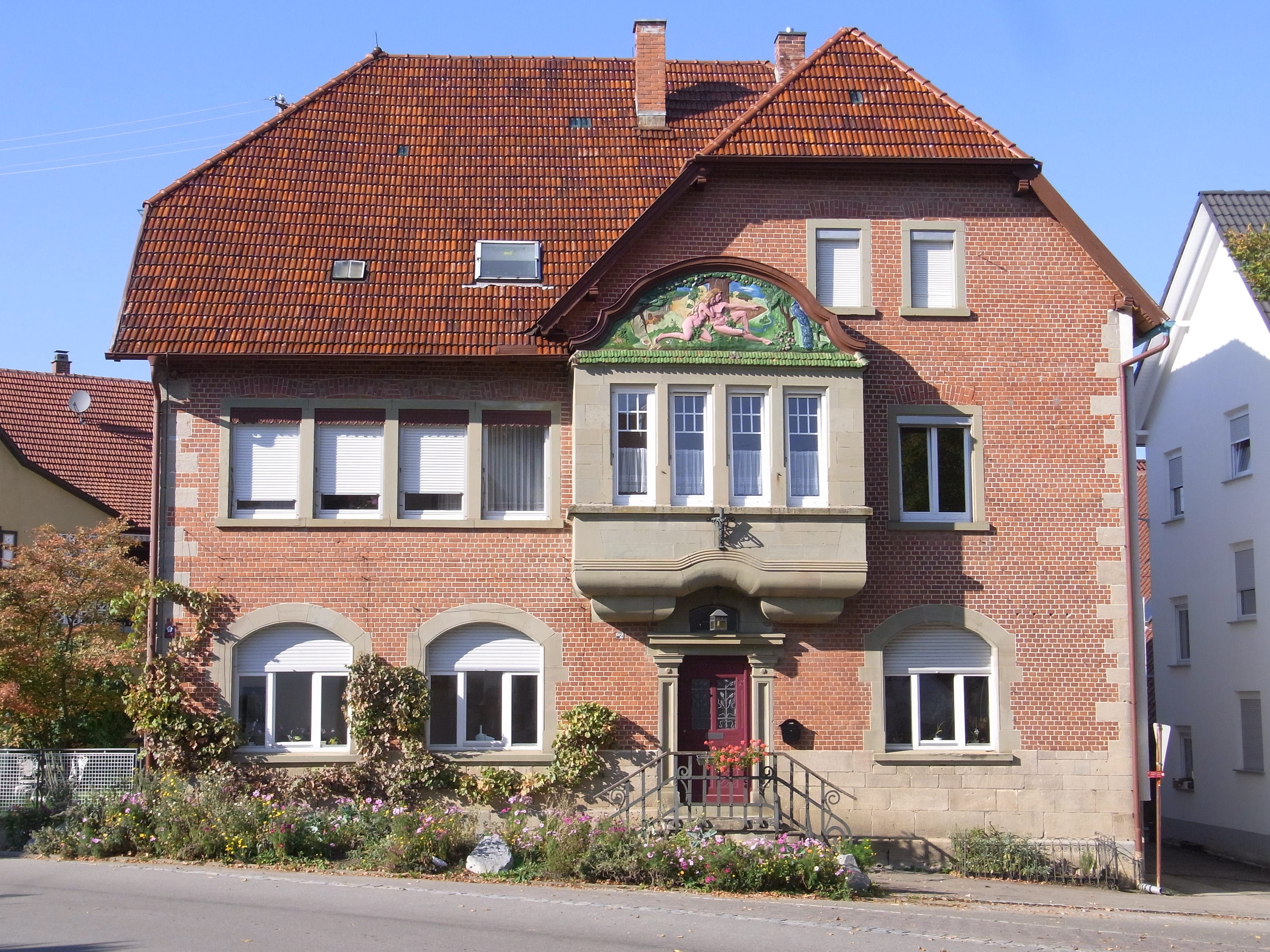 Geislingen-Binsdorf-Jugendstilhaus-Zum Paradies